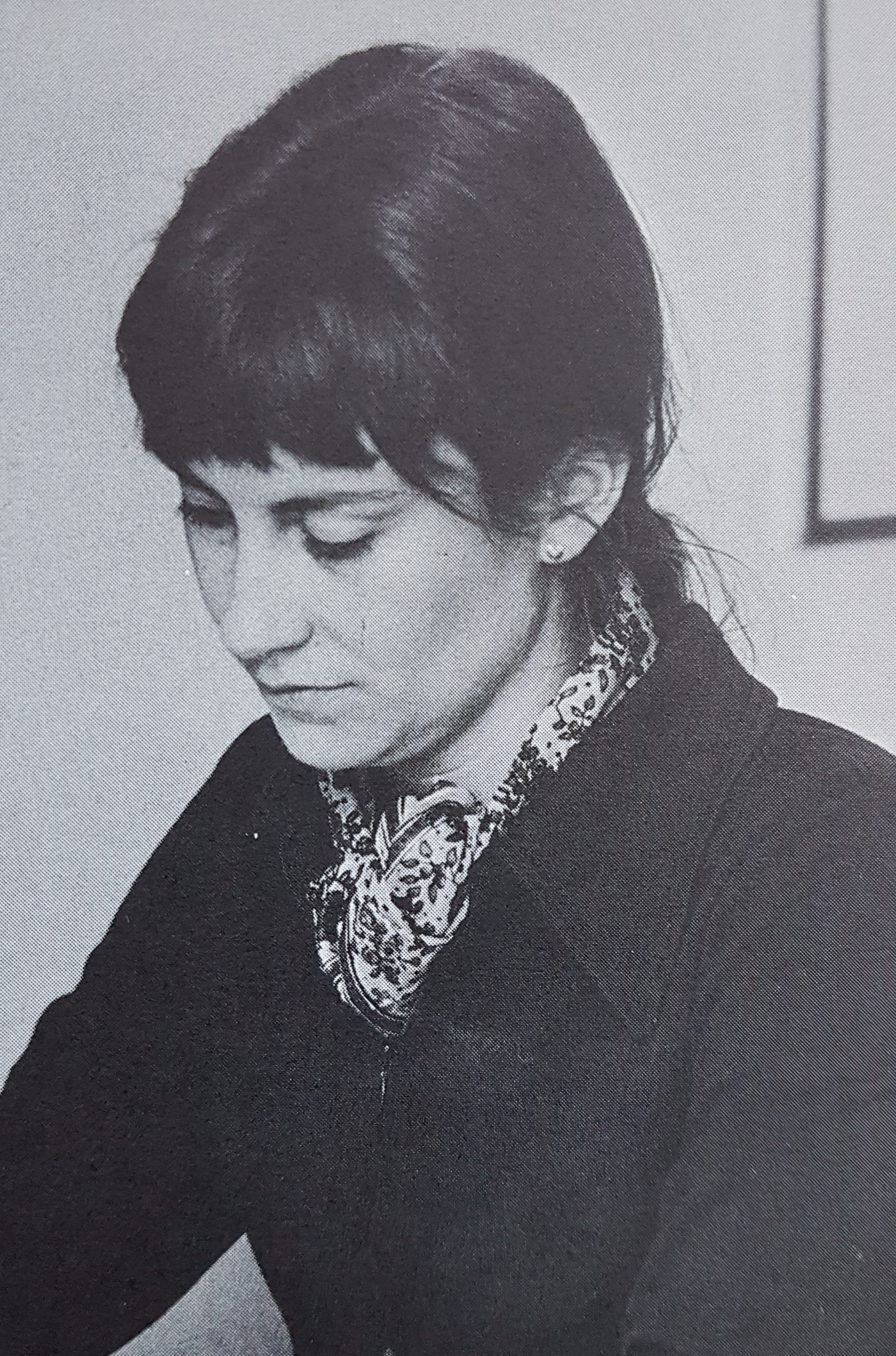 Gertrud Samén Artist from Sweden